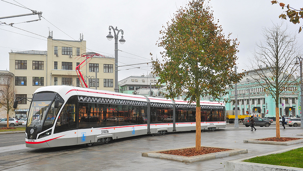 Трамвай Витязь-М 71-931М № 31076 на площади Тверская Застава